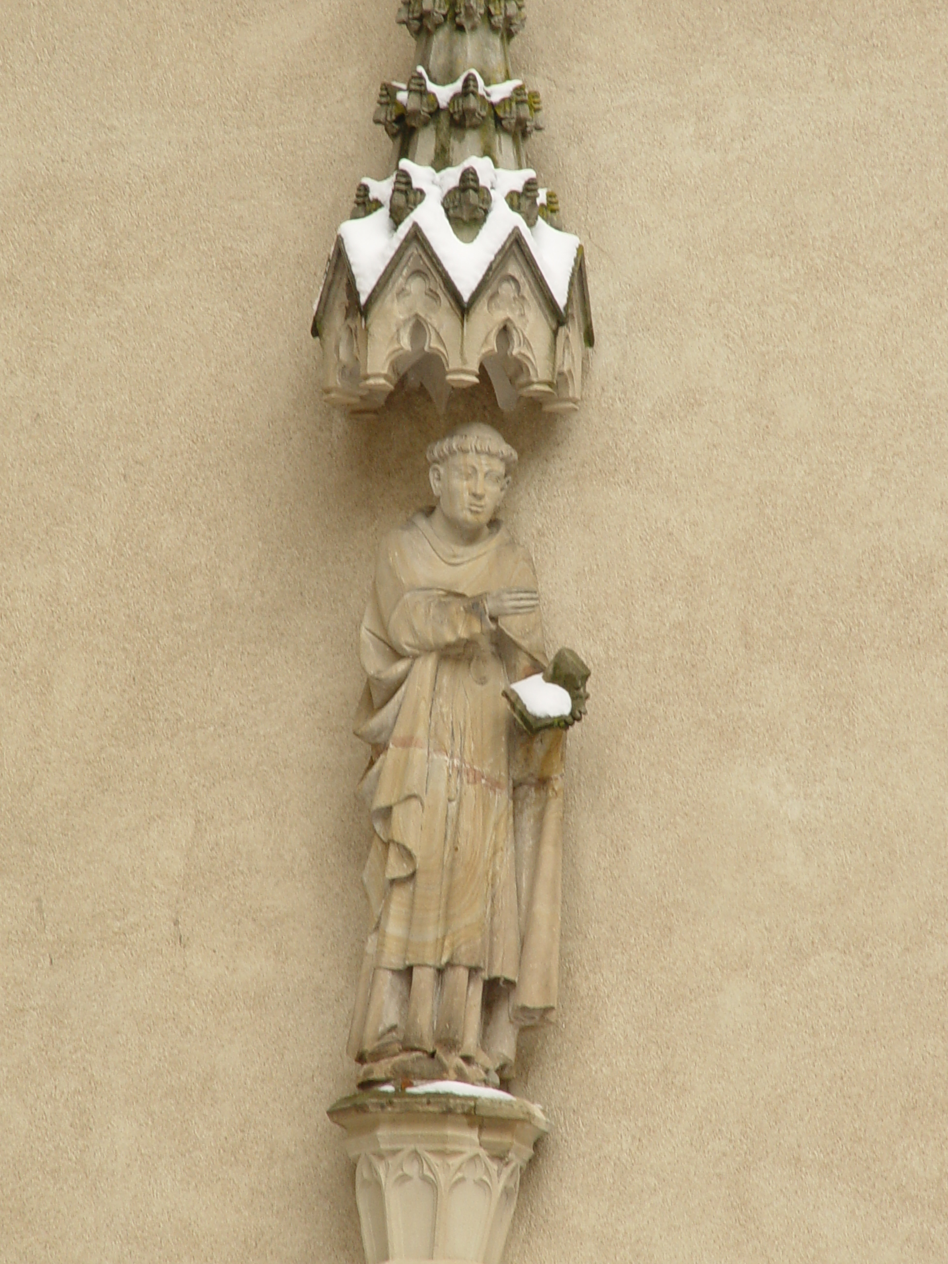 Statue von Gerungus, dem ersten Abt des Kloster Allerheiligen. Fotographiert in Lichtental über dem Portal der Fürstenkapelle im Kloster Lichtenthal.